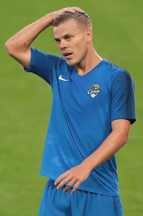 Штанга спасла «Сочи» от поражения в матче с «Локомотивом»